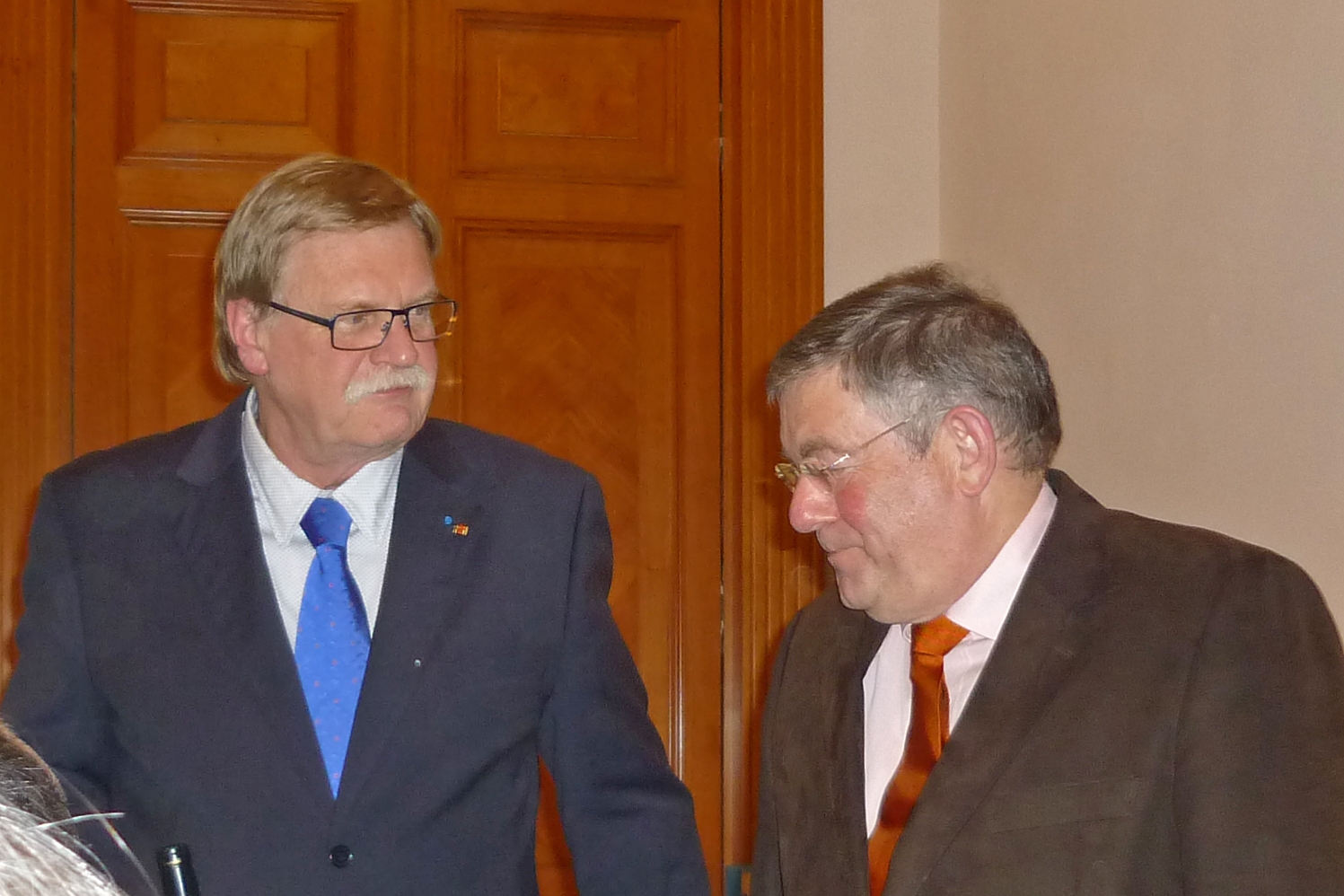 Ehrung des Schriftstellers Dr. Manfred Flügge durch Prof. em. Dr. Dr. h.c. Ingo Kolboom anlässlich der Verleihung des Literaturpreises "Hommage à la France" am 29. Nov. 2014 im Lingnerschloss in Dresden